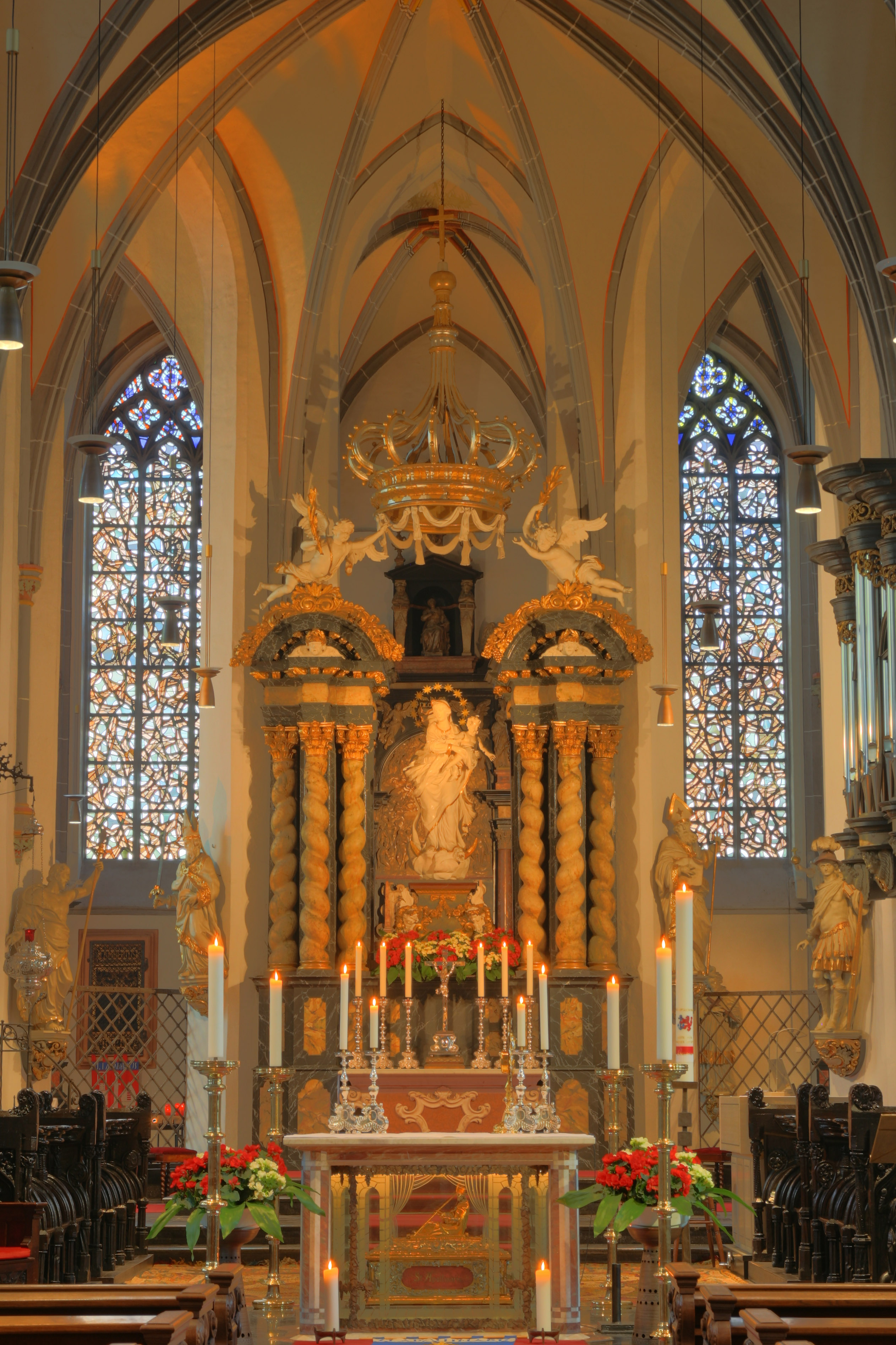 St Lambertus Church, Düsseldorf, Germany